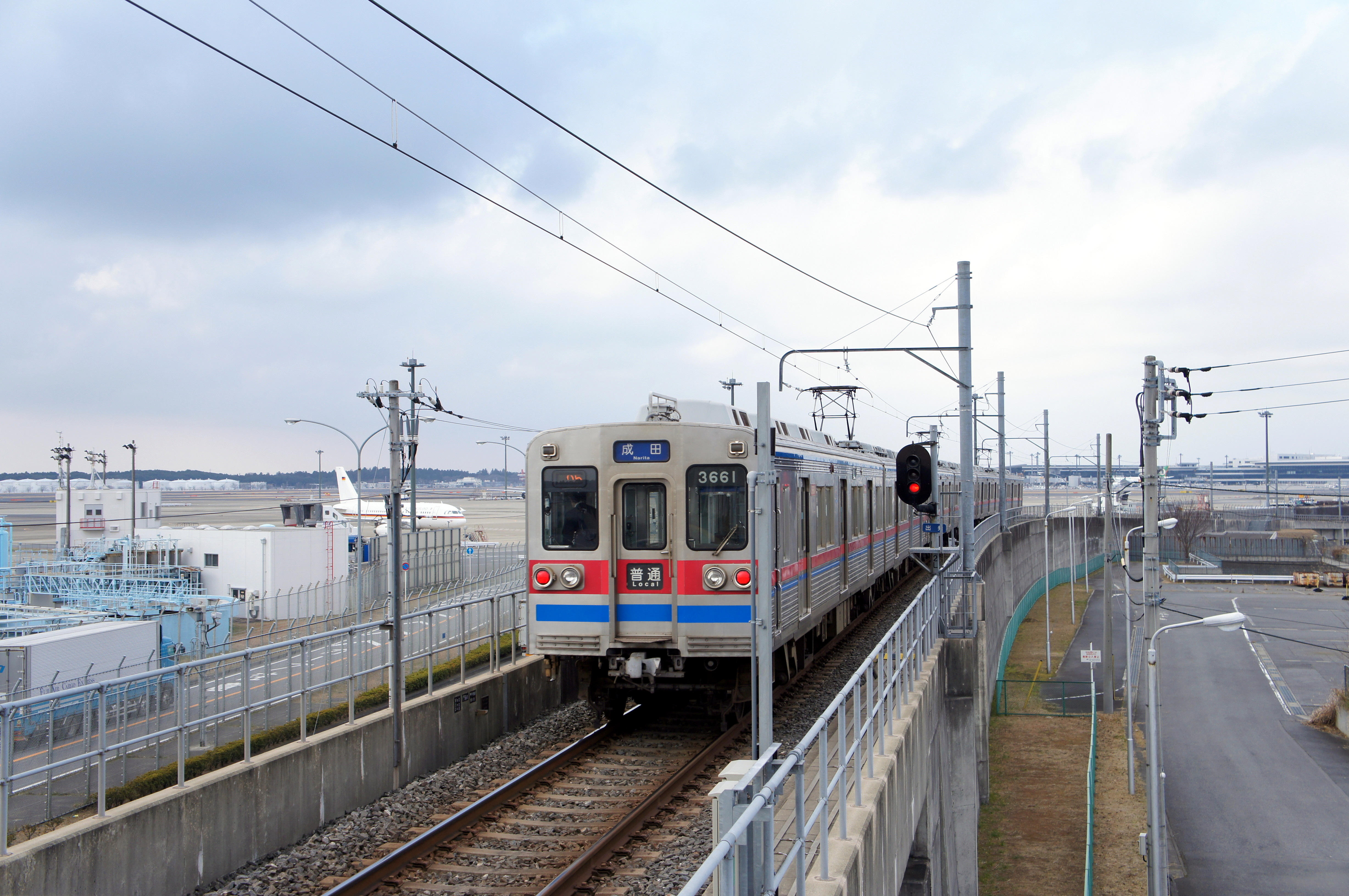 芝山鉄道線の柴山千代田駅を発車して成田方面へ向かう電車。